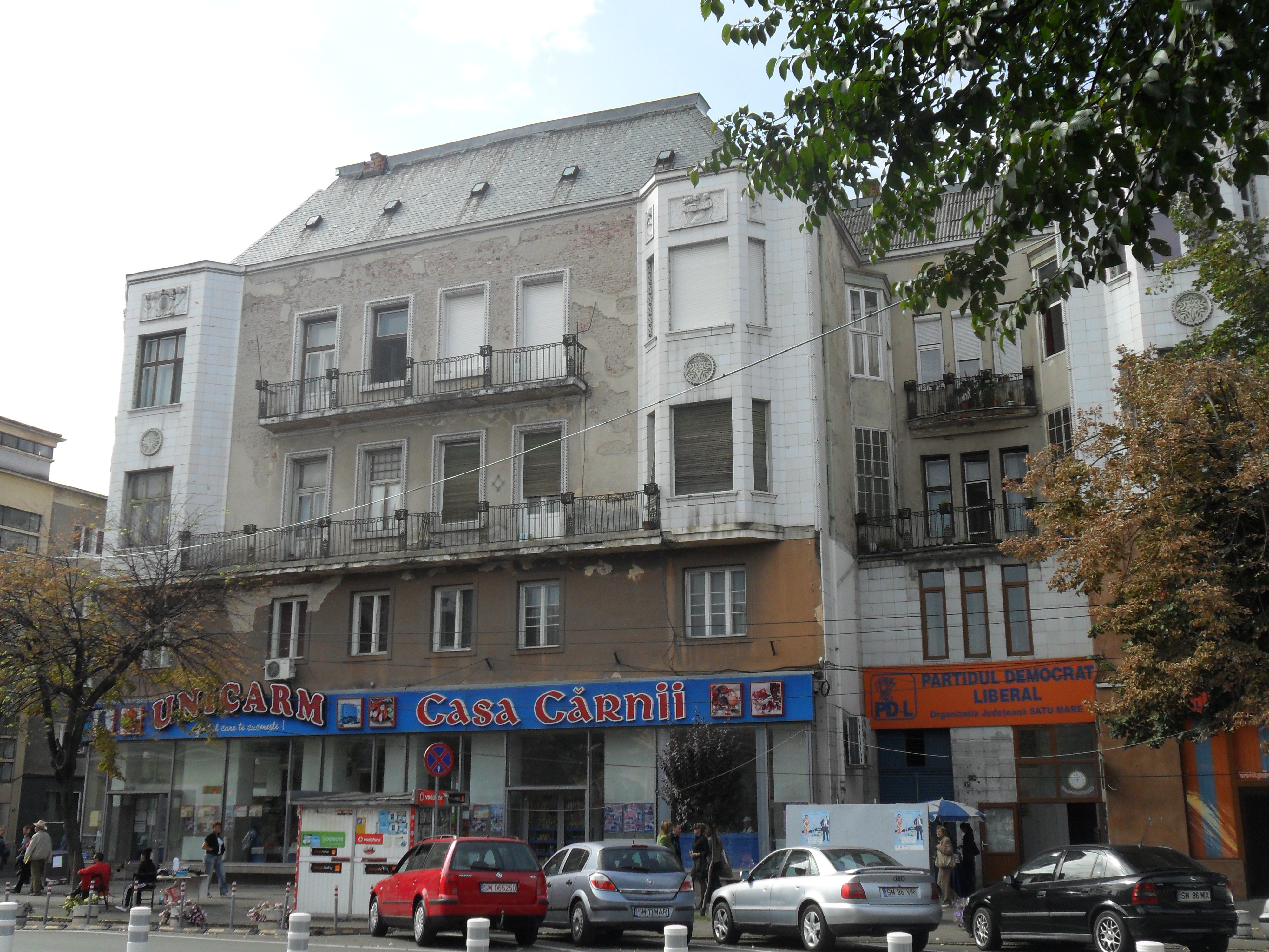 Casa Albă